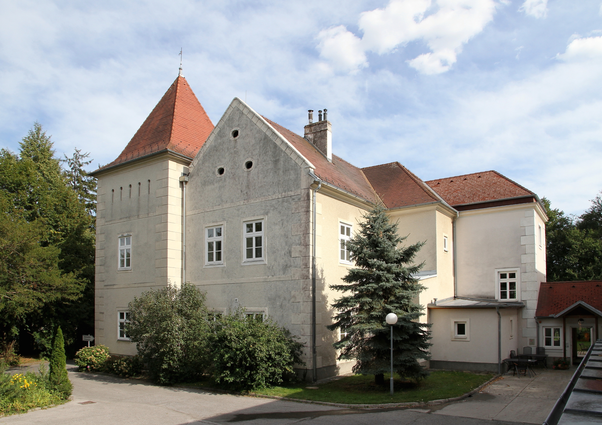 Ehemaliges Schloss Rohonczy in der Bezirkshauptstadt Oberpullendorf.